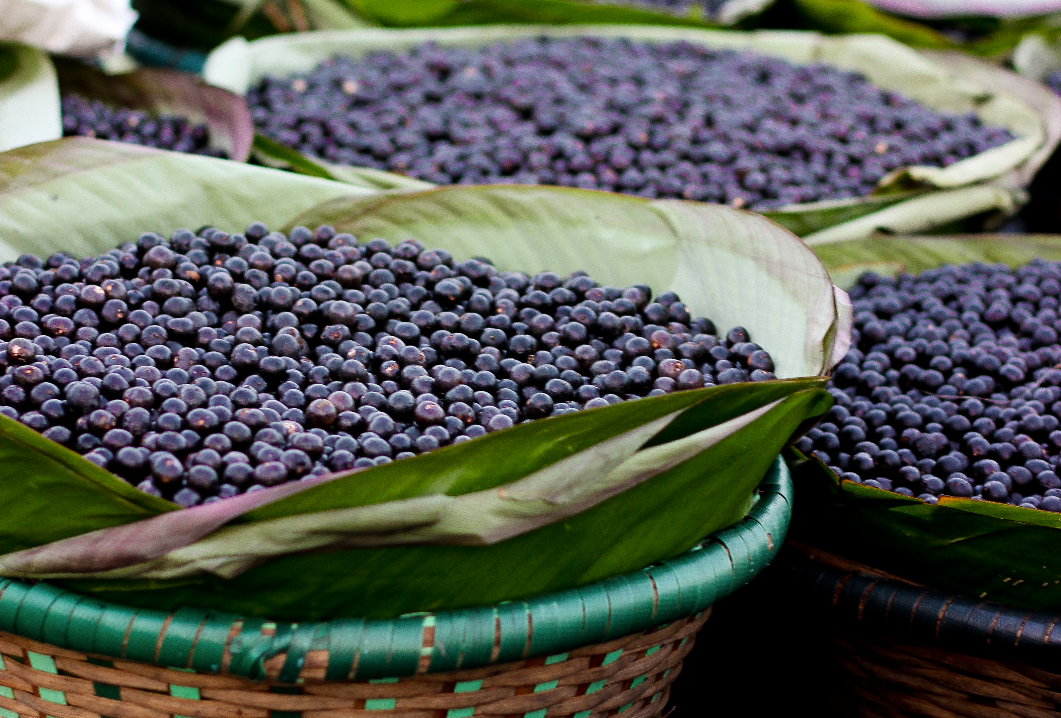 Feira do Açaí no Mercado "Ver-o-Peso".